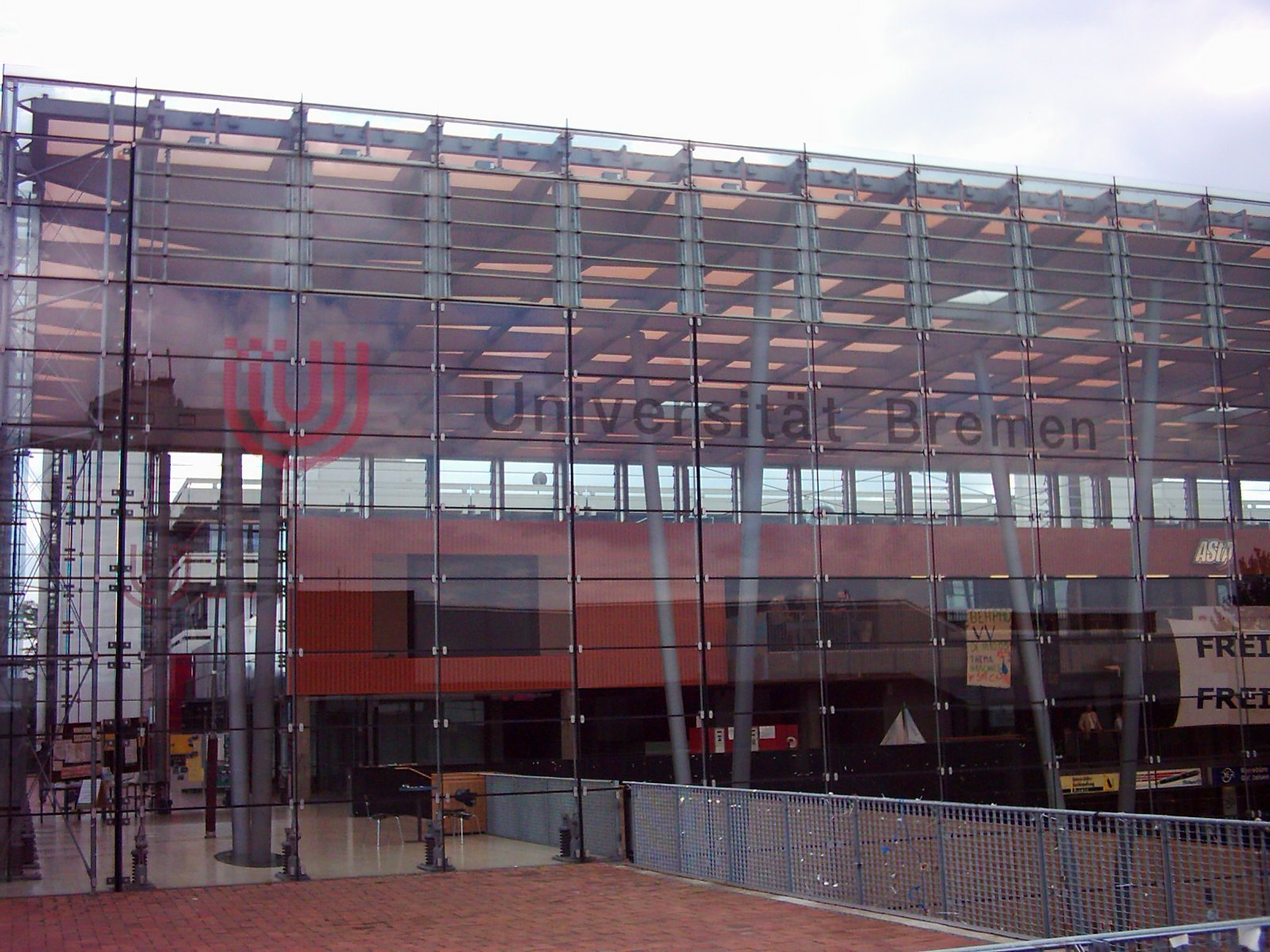 Glashalle der Universität Bremen.